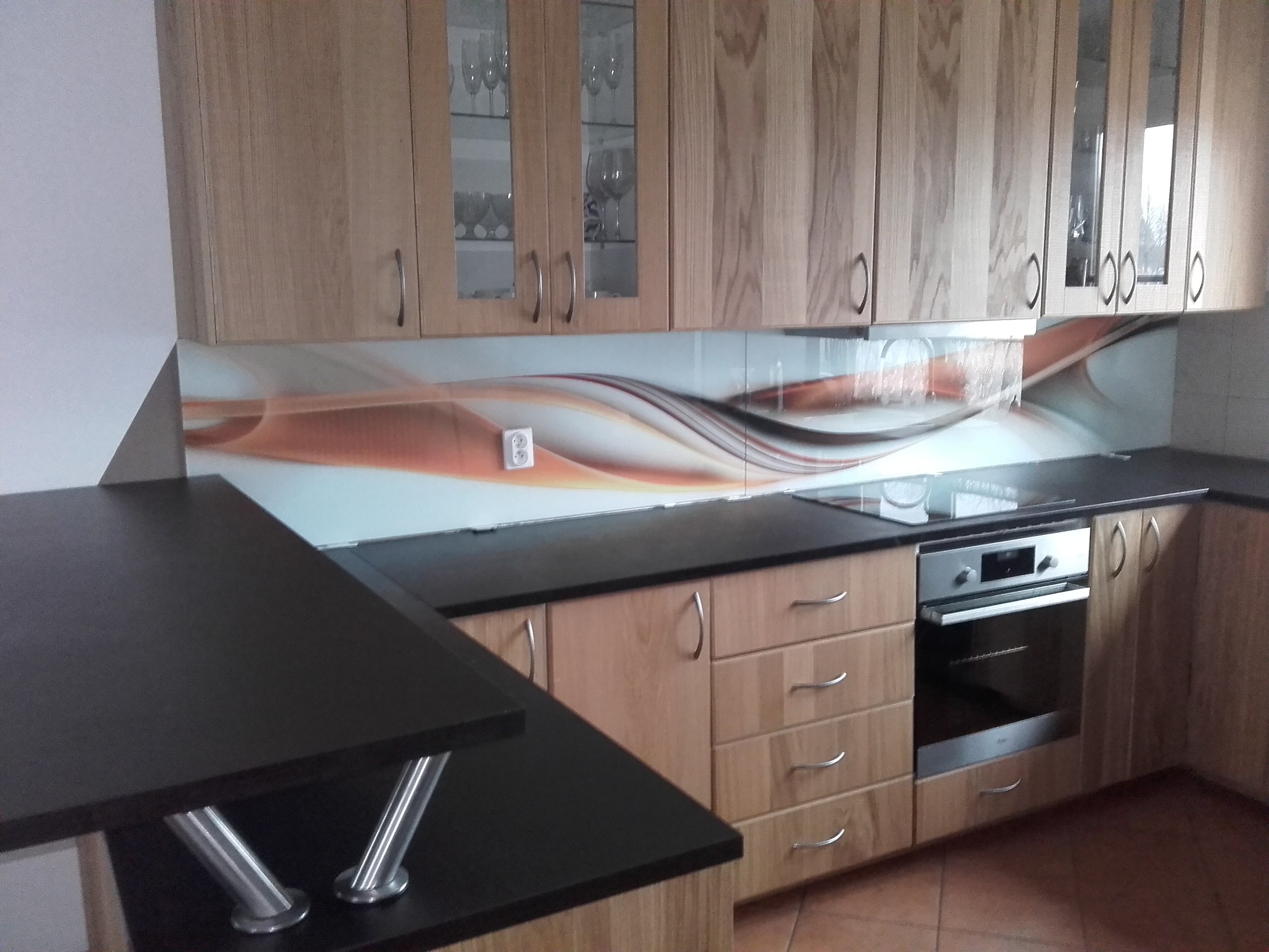 Szkło laminowane z grafiką opus glass do kuchni.